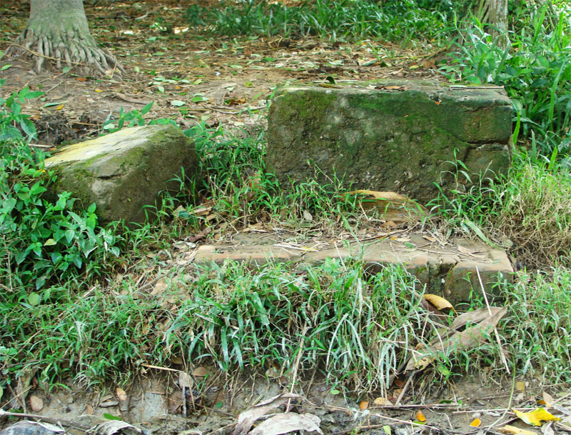 ধলঘাট সংঘর্ষের স্থানে নিহত বিপ্লবীদের স্মরণে নির্মিত স্মৃতি স্তম্ভের ধ্বংশাবশেষ।